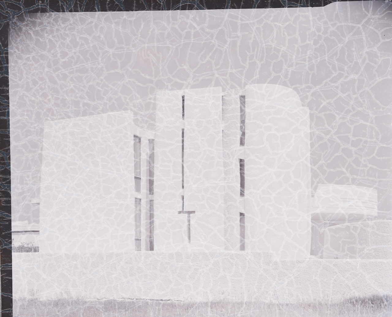 Santa Marinella. Villa detta la Saracena, Esterni e particolari. Servizio fotografico : Santa Marinella, 1957 / Paolo Monti. - Buste: 10, Fototipi: 12 : Negativo b/n, gelatina bromuro d'argento/ pellicola ; 10x12. - ((Serie costituita da 10 buste di negativi identificati con i nn.: 2910, 2911, 2912, 2913, 2914, 2915, 2916, 2917, 2918, 2919, 2920, 2921, e tenute insieme da una graffetta. - Le buste sono numerate da 57 a 66. - Alcuni negativi presentano segni di degrado (gelatina raggrinzita, bolle e alterazione tonale). - , presso Archivio Paolo Monti. - Fonte: Monografia di Fleming John, Honour Hugh, Pevsner Nikolaus: Dizionario d'architettura, Torino, Einaudi (1981). - Fonte: Rubrica di Paolo Monti: Archivio 10x12 (ultimi numerati) - dal G1 al (s.d.)